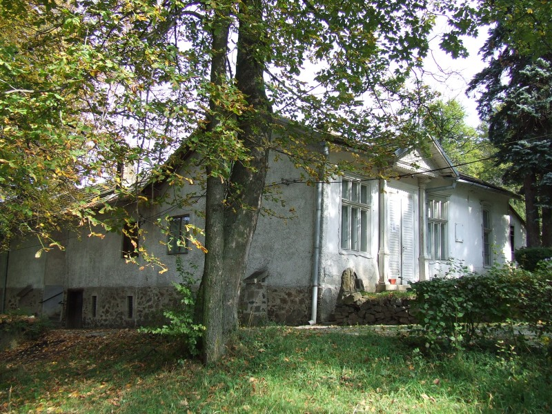 Ciucea castle, Cluj County, Romania